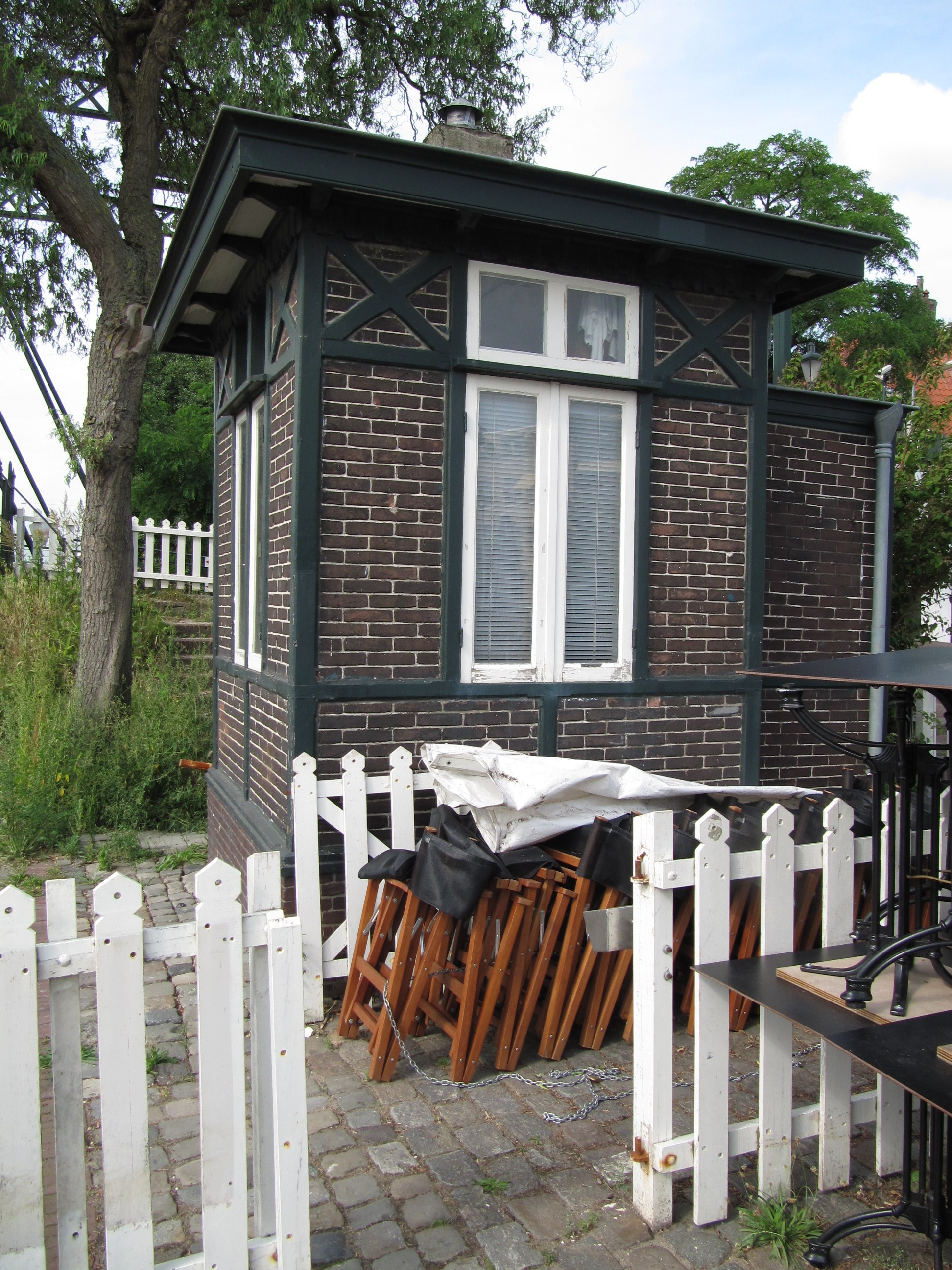 Voorburg - Kerkstraat bij 60.jpg, rijksmonument